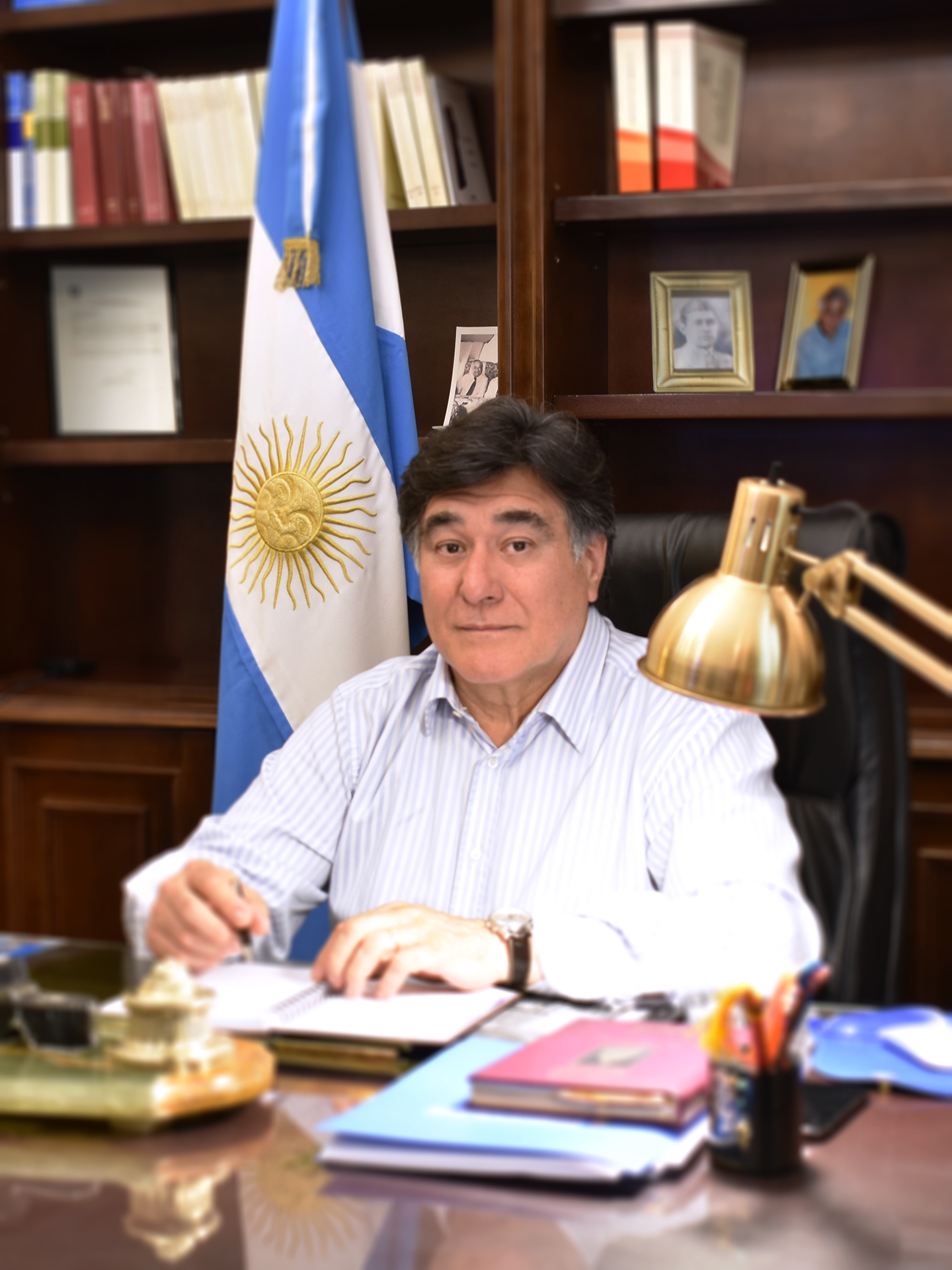 imagen del Procurador del Tesoro de la Nación, Dr. Carlos Alberto Zannini.